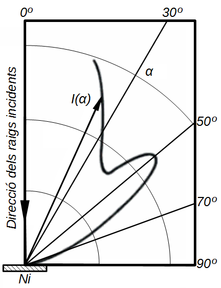 Intensitat dels electrons difractats a l'experiment de Davisson-Germer respecte de l'angle de difracció per a un voltatge de 54 V corresponent a l'azimut {111}.